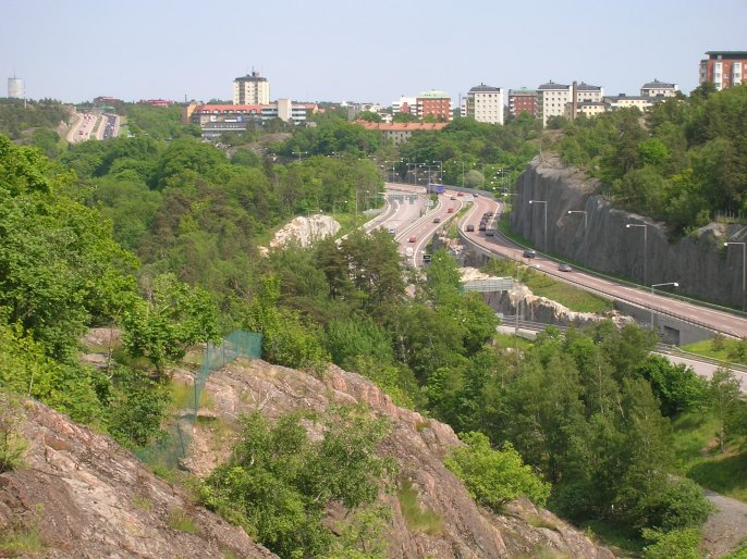 Värmdöleden (road 222) at Alphyddan/Finntorp, Nacka, Sweden.